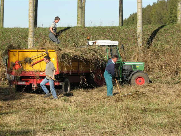 Vrijwilligers hooien manueel in een nat natuurgbied